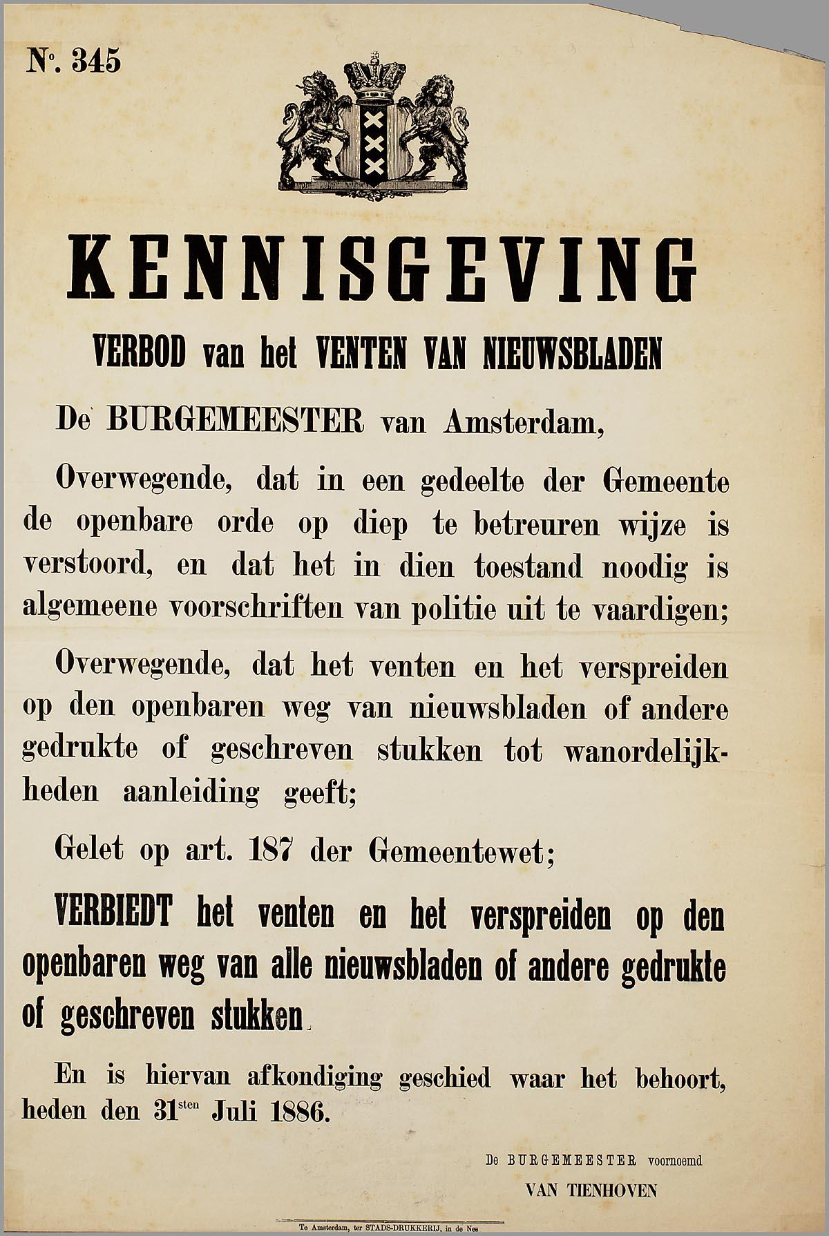 Kennisgeving verbod van venten van nieuwsbladen Amsterdam. Drukker: Th. Bakker, Amsterdam.